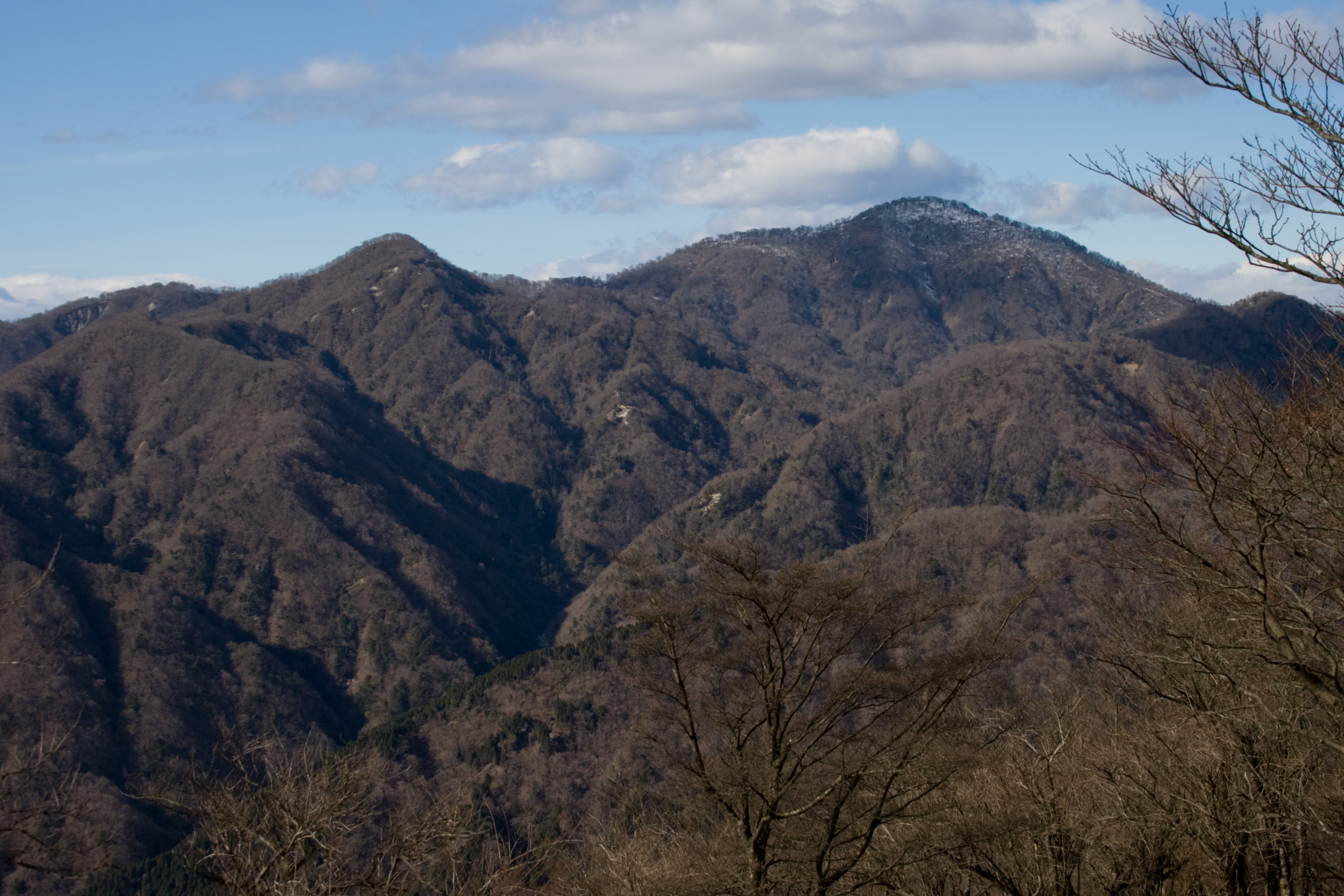 鍋割山より望む同角ノ頭と檜洞丸